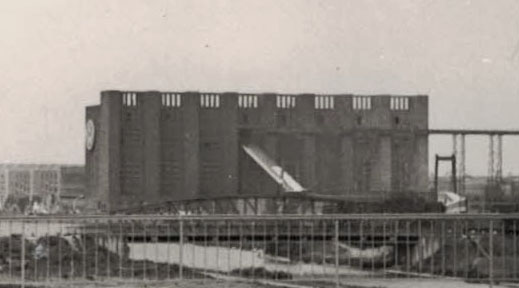 Kraftwerk des Volkswagenwerkes Wolfsburg, von der Berliner Brücke aus gesehen.